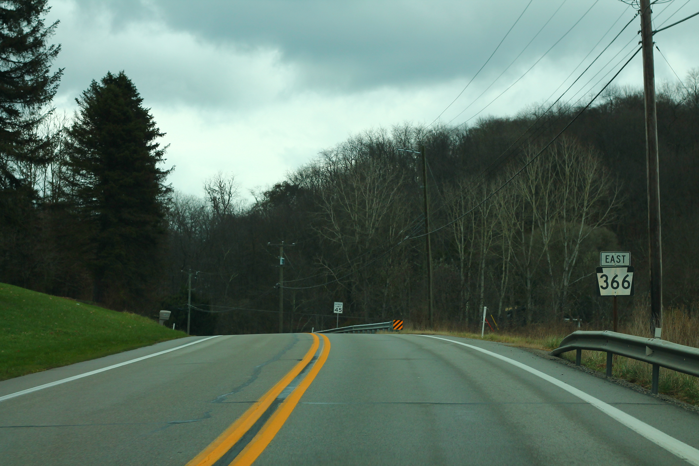 PA366eRoadSign